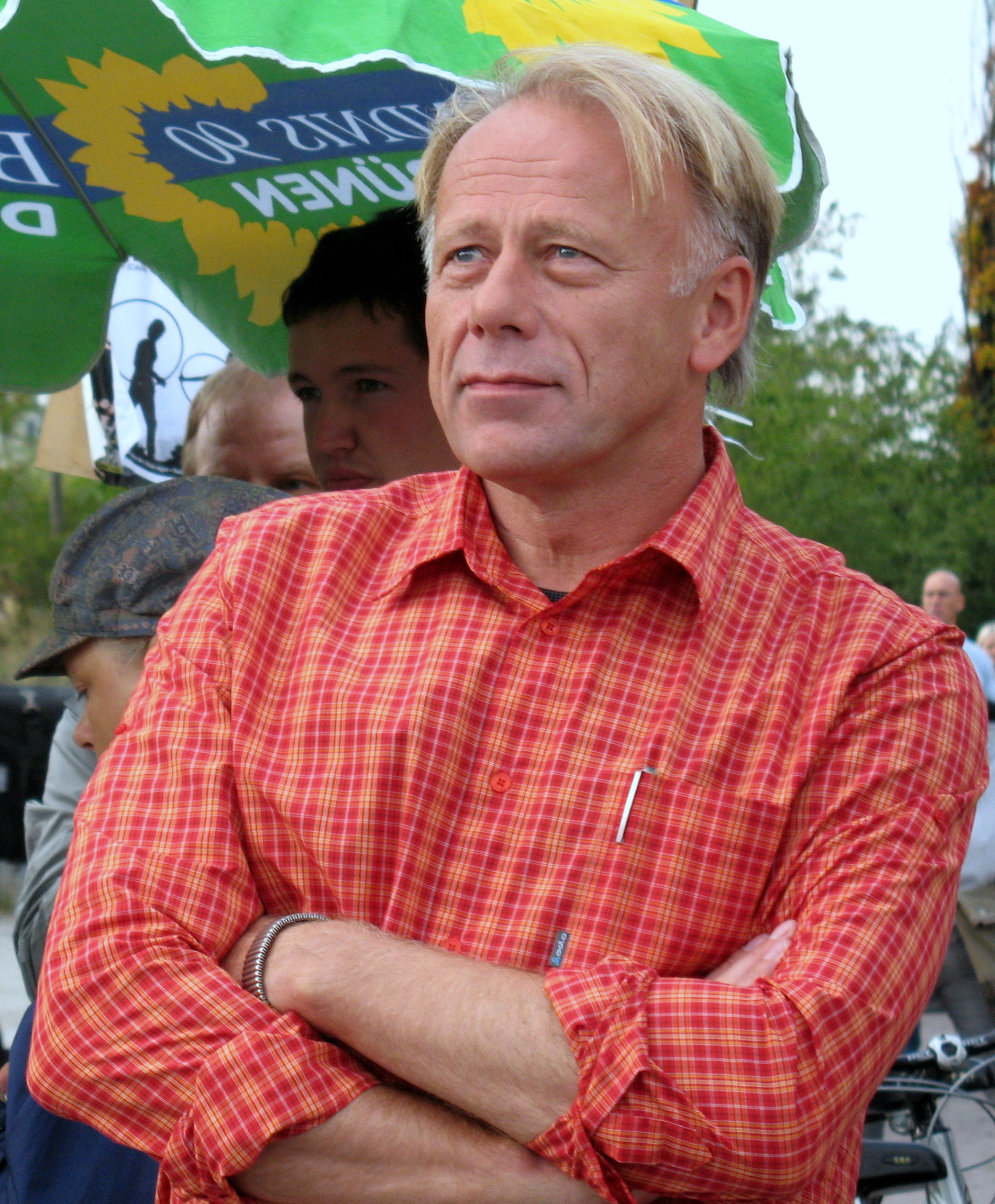 Jürgen Trittin in Berlin-Prenzlauer Berg am Eingang Mauerpark Bernauer Straße, 6.09.2009